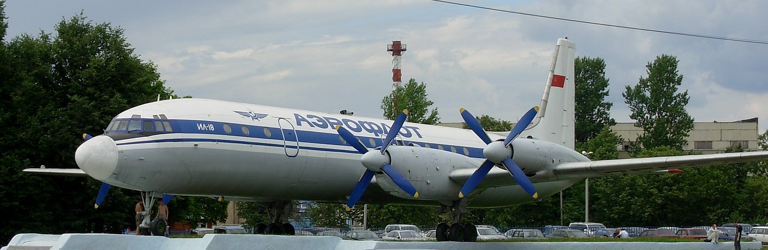 Samolot Iluszyn Ił-18 jako pomnik przed Terminalem 1 lotniska Szeremietiewo w Moskwie, lipiec 2006 r.